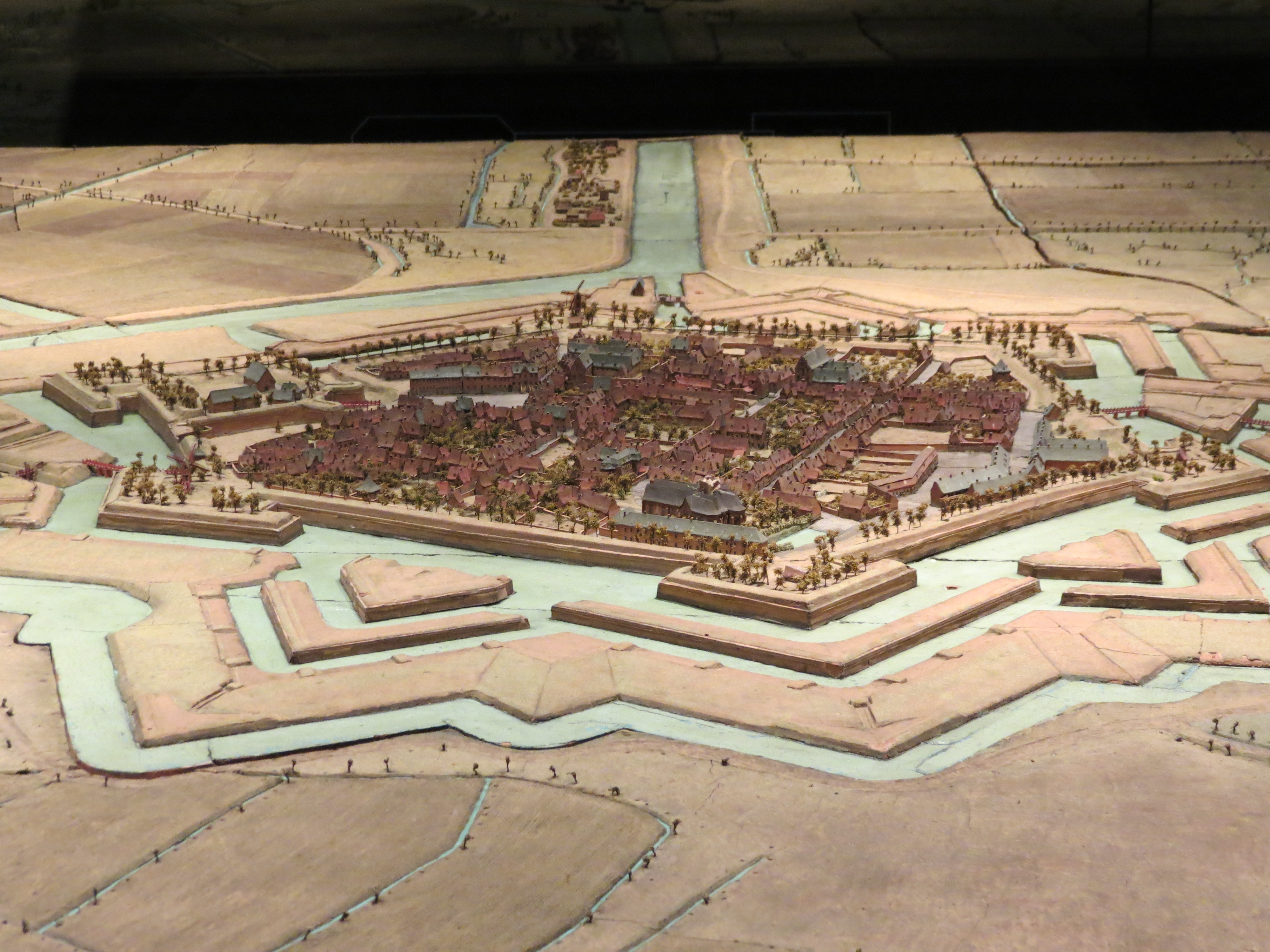 Plan Relief 06 Gravelines 2 PBA Lille 2019